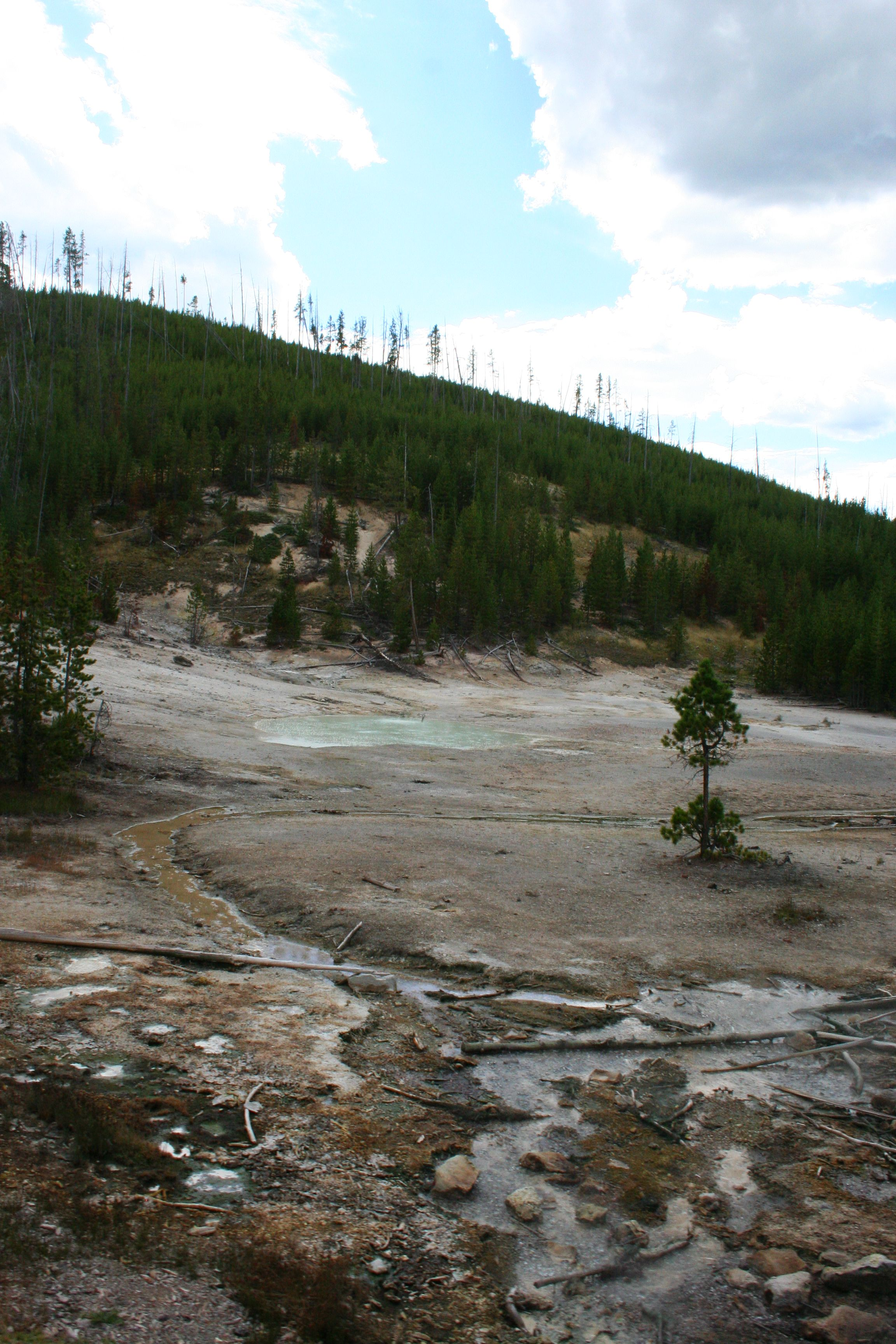 Artist Pointpot w Parku Yellowstone